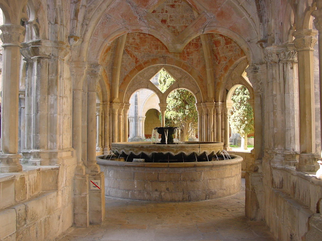 Templete en el claustro del monasterio de Poblet (Tarragona). Pavilion in the cloister of Poblet monastery (Tarragona).